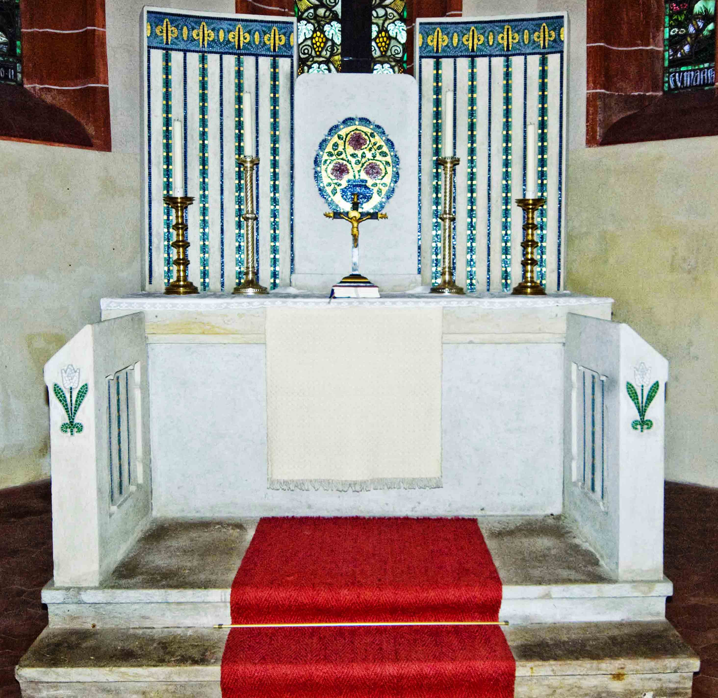 Jugendstilaltar in der Kirche Schrebitz